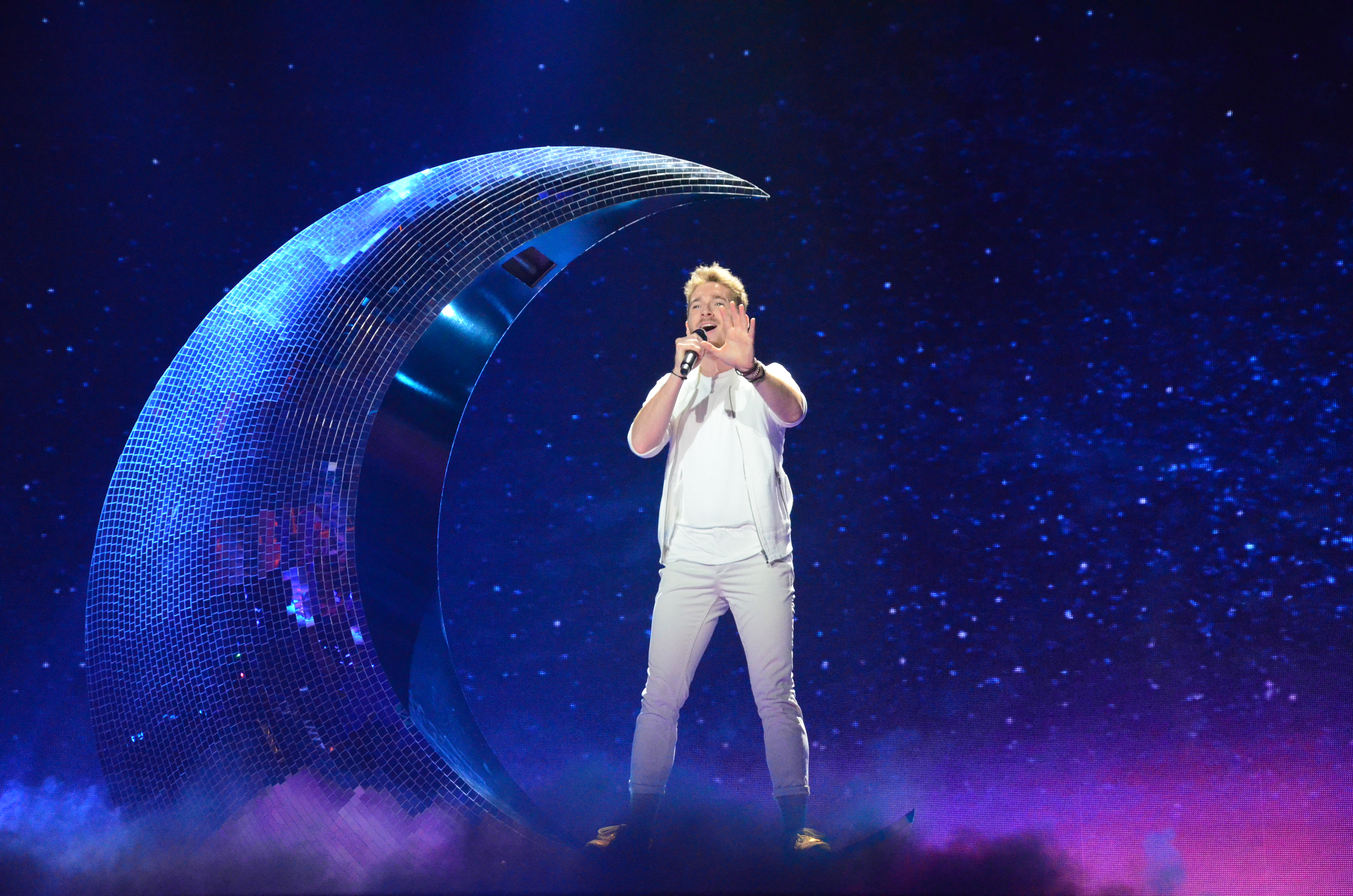 12 травня. Генеральна репетиція фіналу Євробачення 2017. Nathan Trent, Austria.